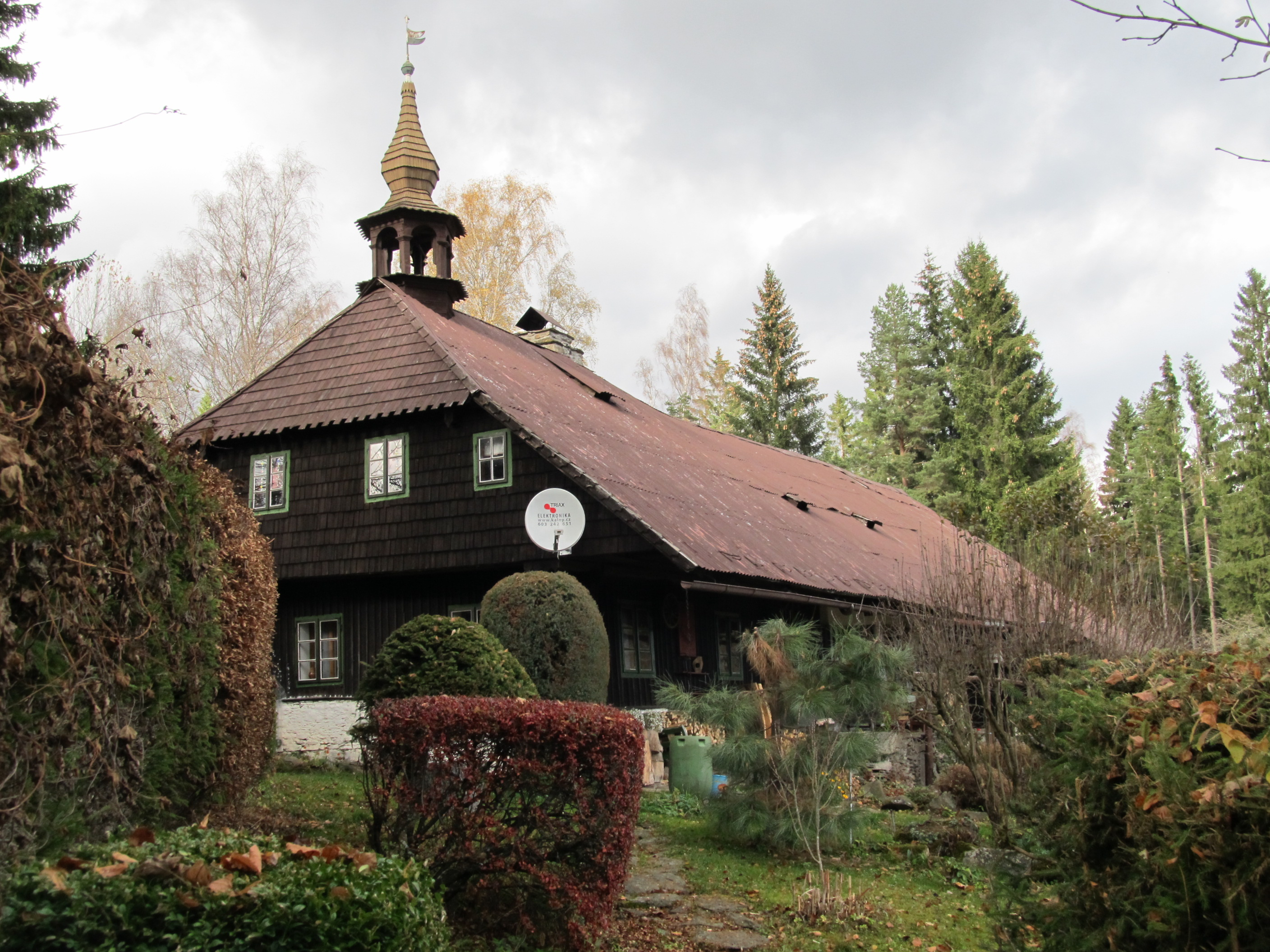 Srní - usedlost čp 9